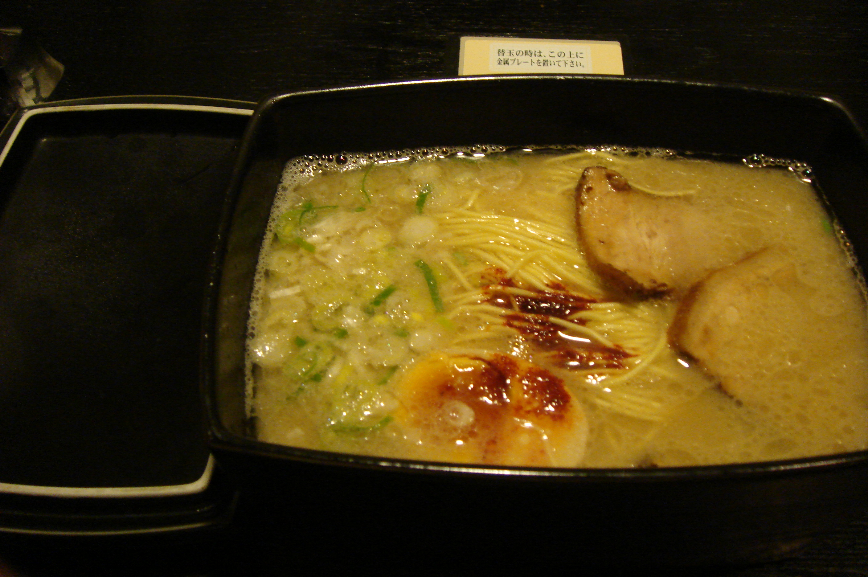 一蘭のラーメン（博多ラーメン）